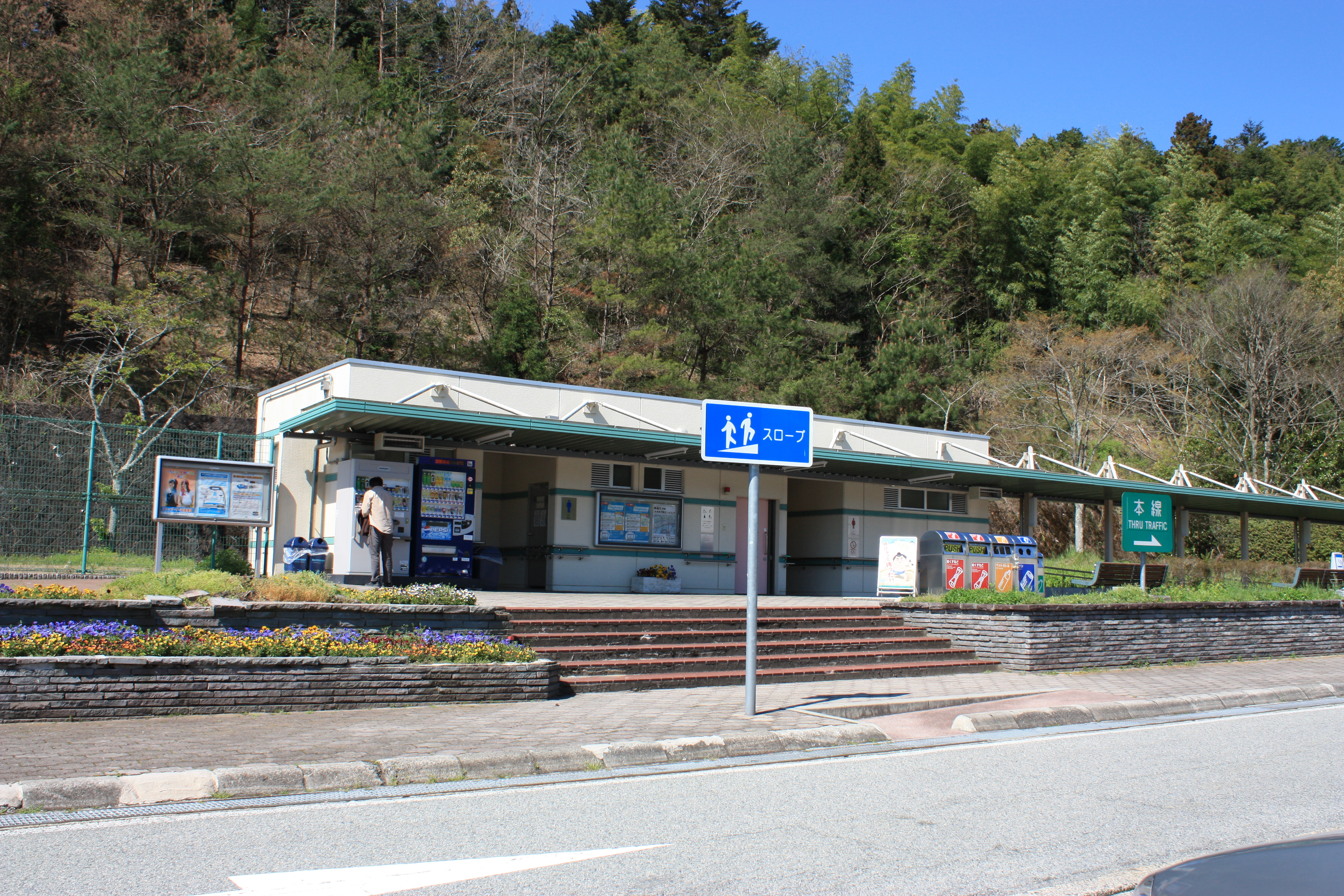 Chugoku Expressway Ibogawa Parking Area